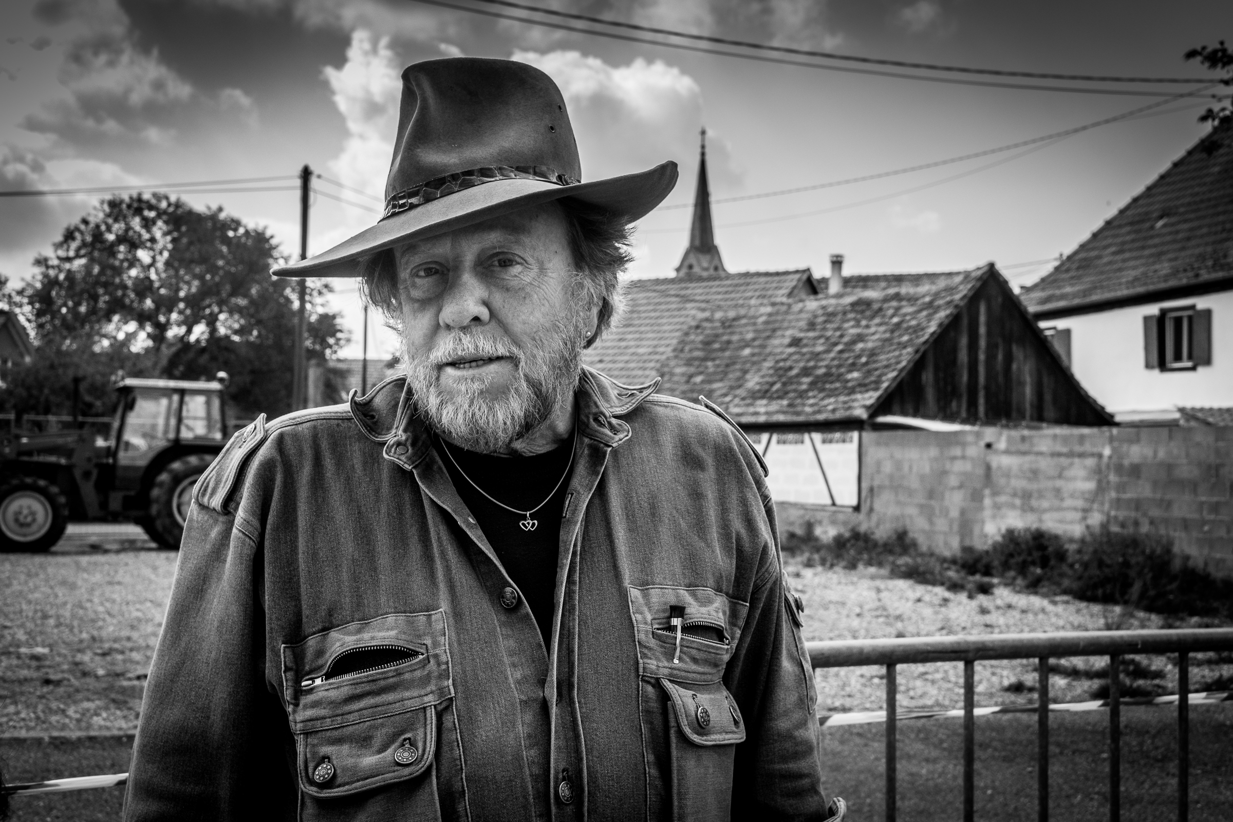 Gunter Demnig par Claude Truong-Ngoc